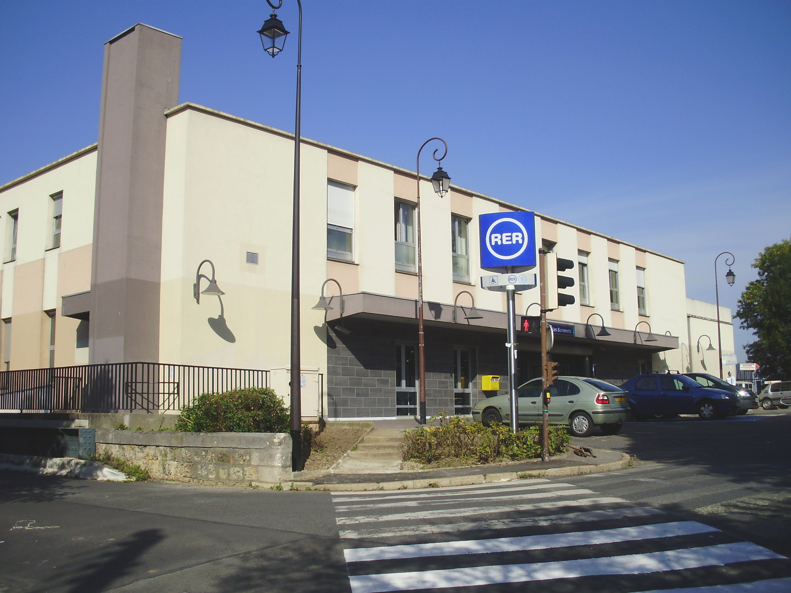 Gare des Baconnets, à Antony, Hauts-de-Seine, France (entrée principale, rue des Garennes, au sud-est des voies)